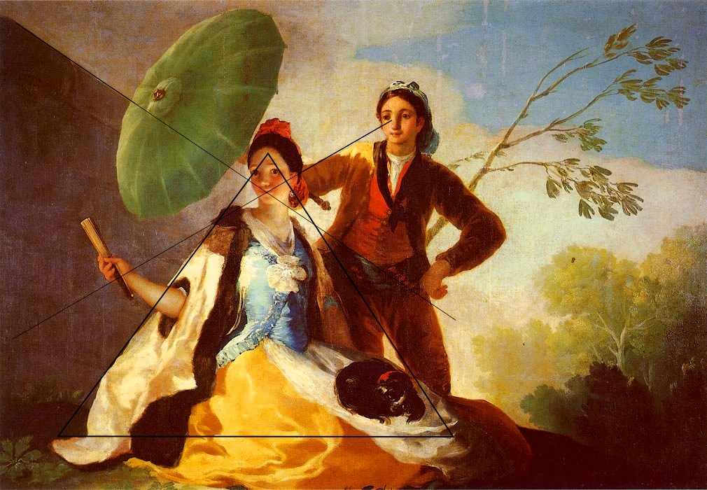 Líneas de fuerza de la composición de El Quitasol